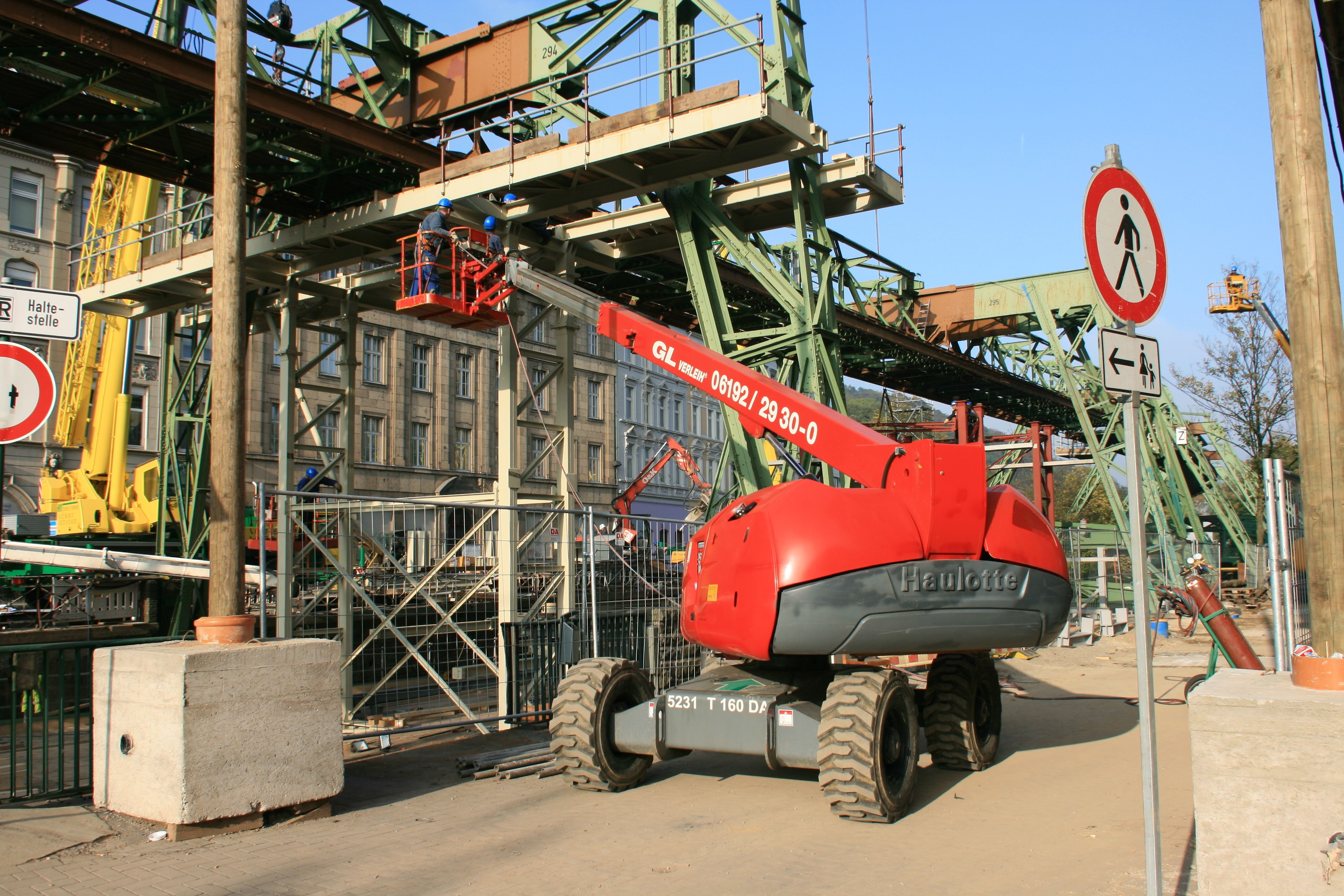 Abbau der alten und „formidentischer Wiederaufbau“ der neuen Schwebebahnstation Landgericht in Wuppertal